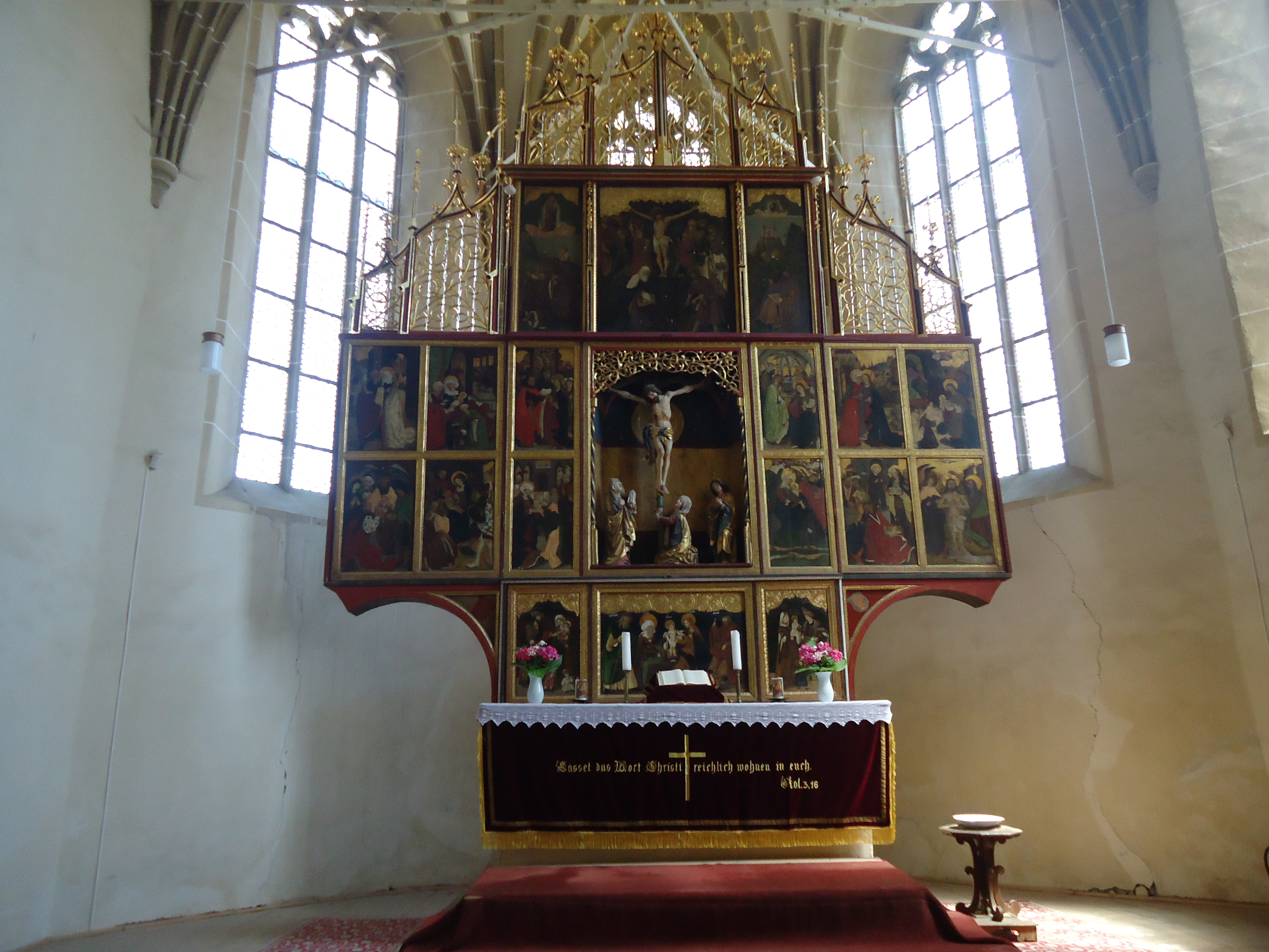 Altarul bisericii fortificate din Biertan